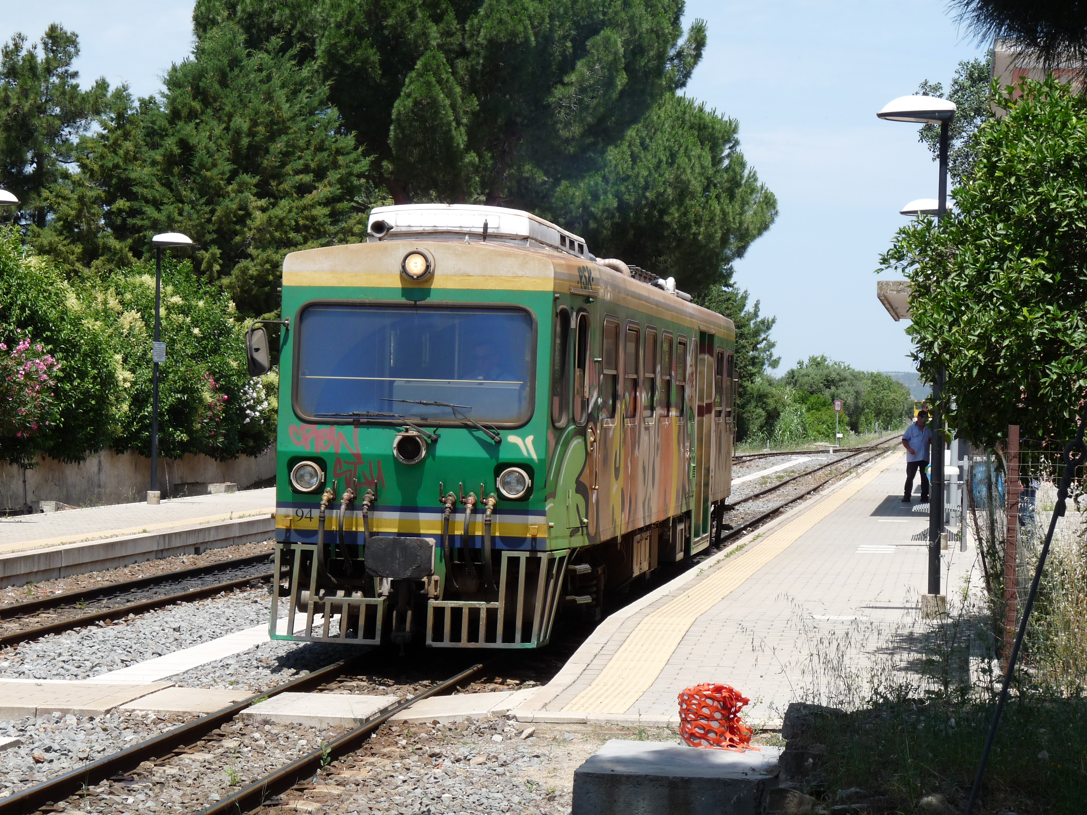 Trein in Dolianova station